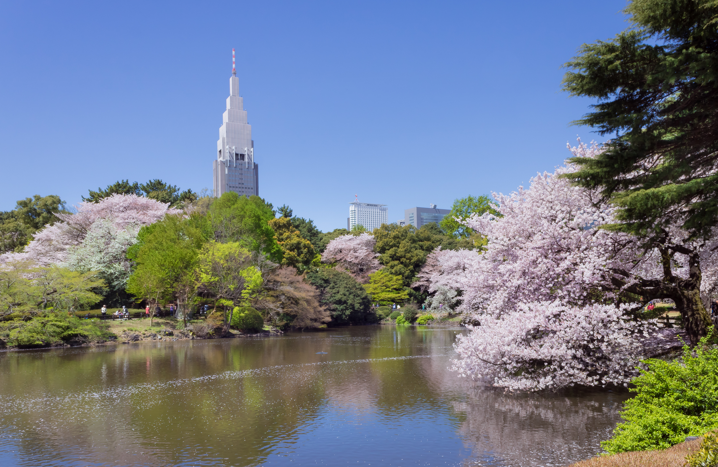 新宿御苑の桜